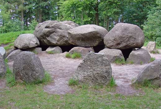 Hunebed de Papelozekerk (D49) bij Schoonoord (onbedekt gedeelte)